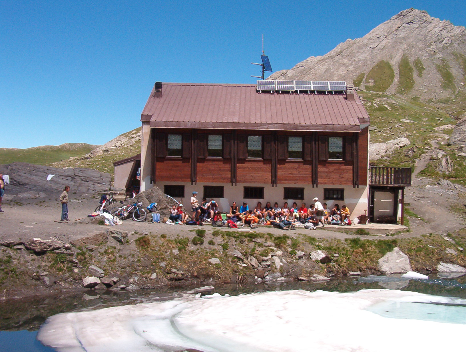 Rifugio Lago Verde - Provincia di Torino - Italia